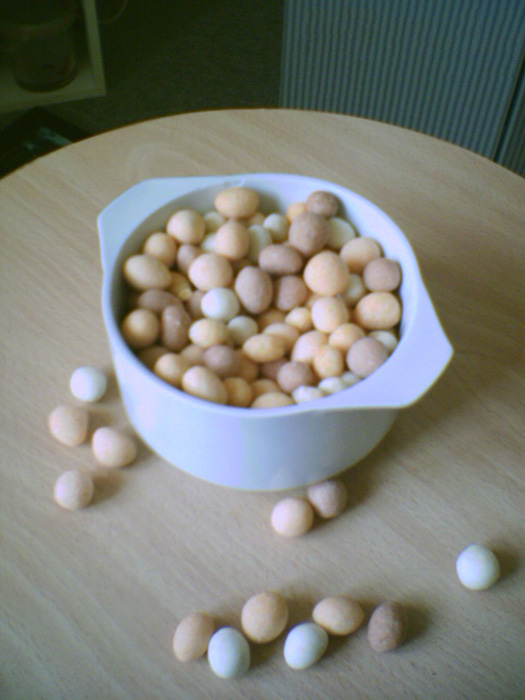 Zojuist een zak cocktailnootjes gekocht bij supermarktketen Coop. Vervolgens met de GSM van m'n vriend een paar plaatjes geschoten, en de beste daaruit gepikt. Ik ben niet sterk in fotograferen en telefoonfoto's zijn niet zo heel best, dus als er een betere foto gemaakt wordt, vind ik het ook prima. Categorie:Snack